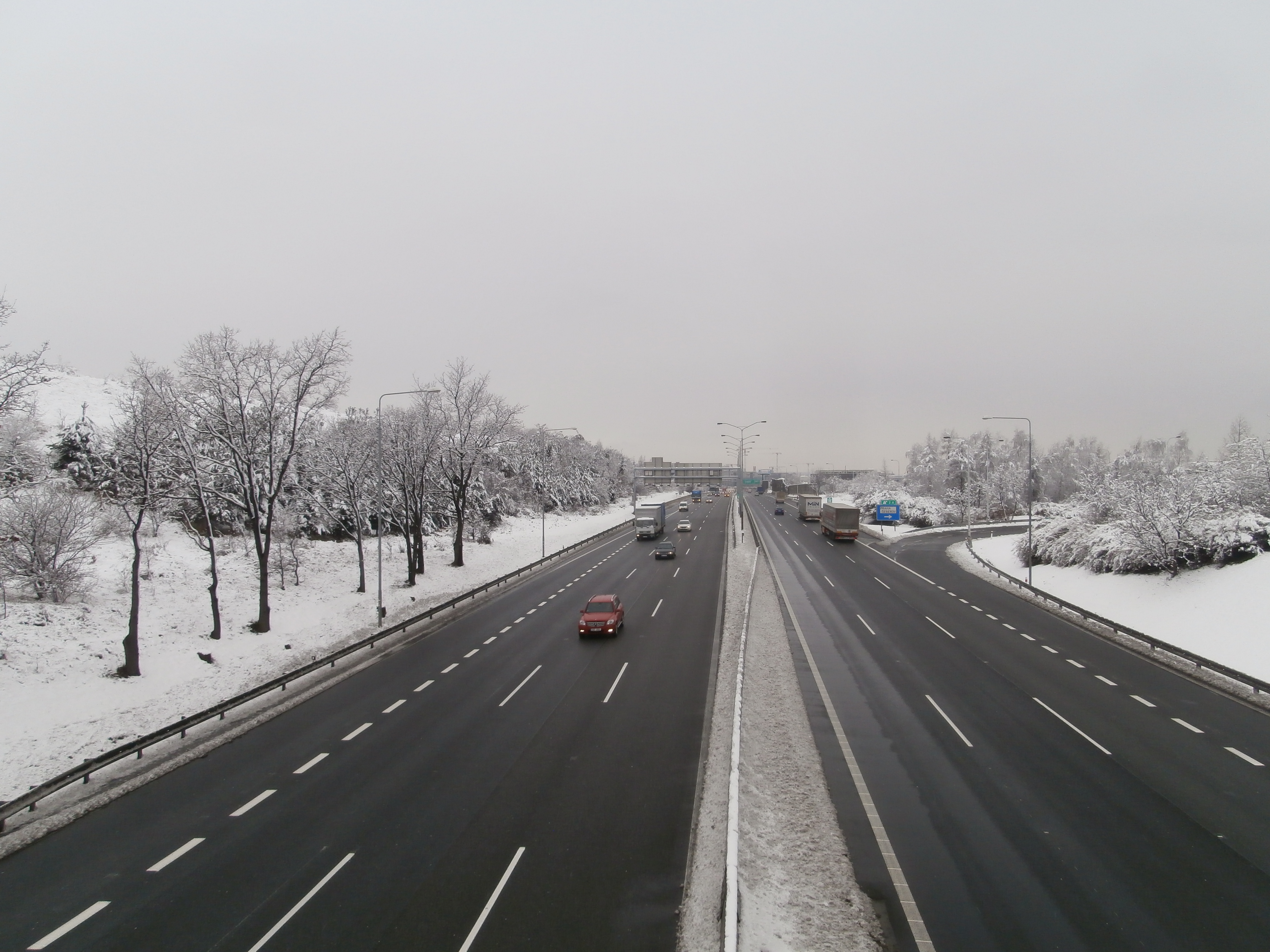 Dálnice D1 na příjezdu do Prahy, 2. kilometr ve směru do centra (odbočka z Brněnské do Chilské směr Šeberov), v zimě, 1. 3. 2016